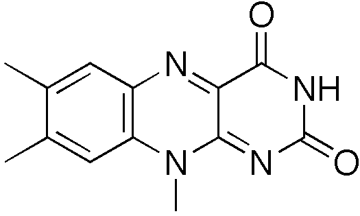 chemical structure of lumiflavin